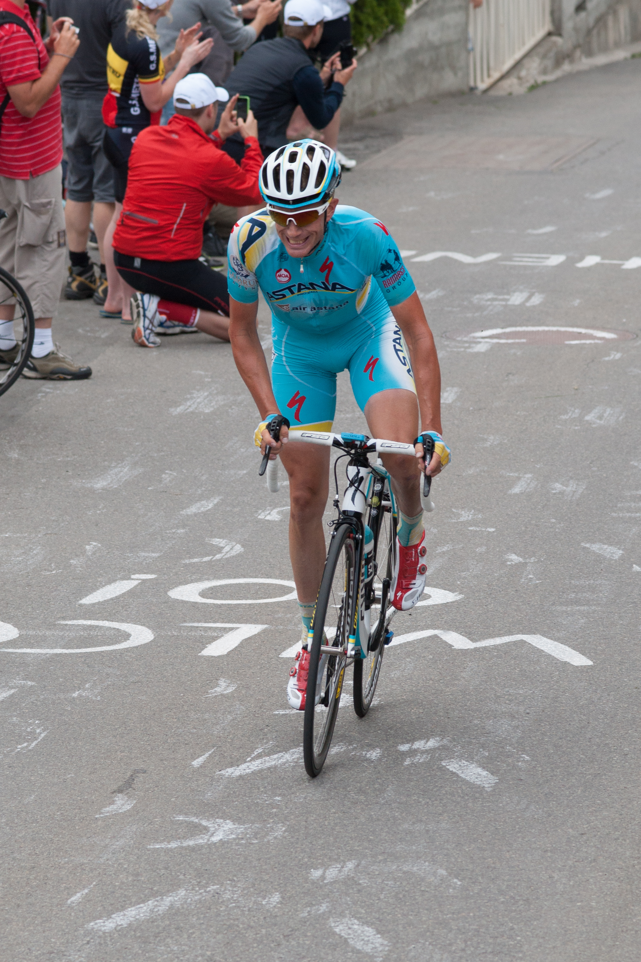 Critérium du Dauphiné 2014 - Etape 7 - Lieuwe Westra à Finhaut